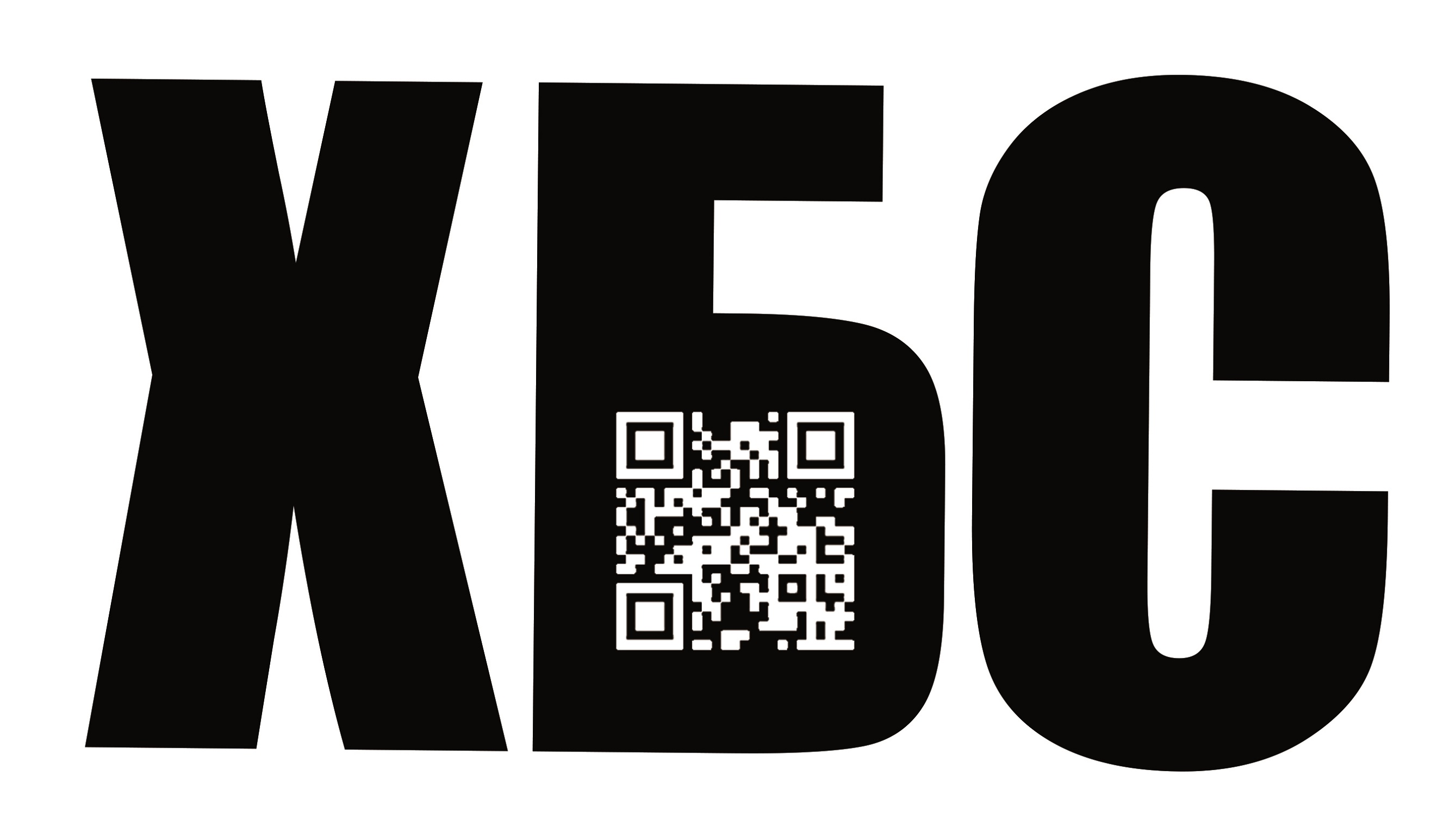 ХБС фото